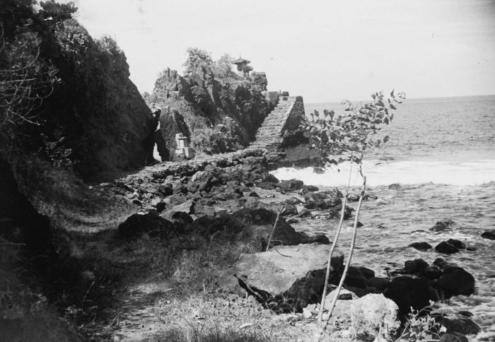 negatief. De Pura Batu Bolong aan de kust bij Ampenan